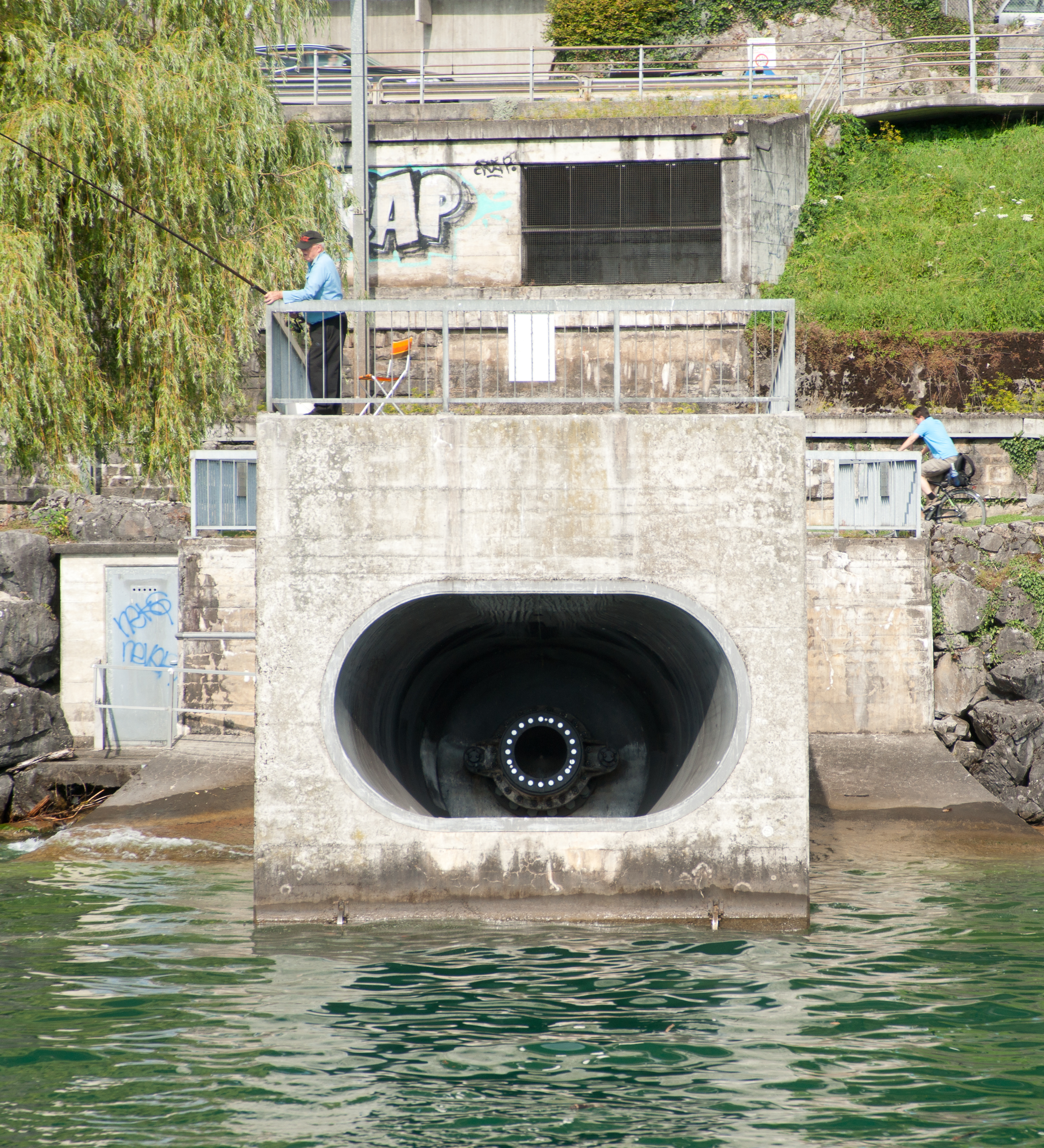 Vanne de fond du barrage de l'Hongrin dans le Léman. Le piéton donne l'échelle.